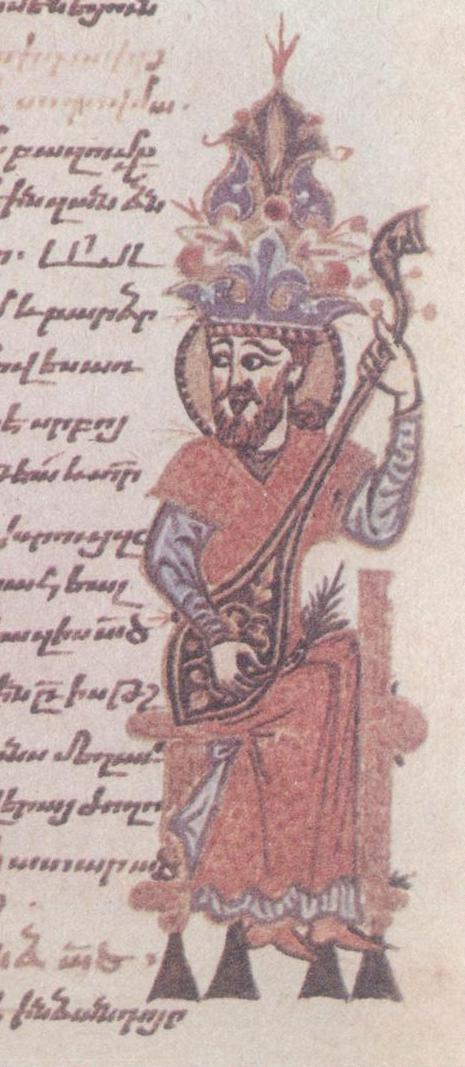 Матенадаран, рукопись № 346, стр., 280а. Музыкант с сазом в руке